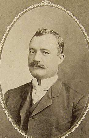 General de división y gobernador del estado de Zacatacas en 1914, Luis Medina Barrón.